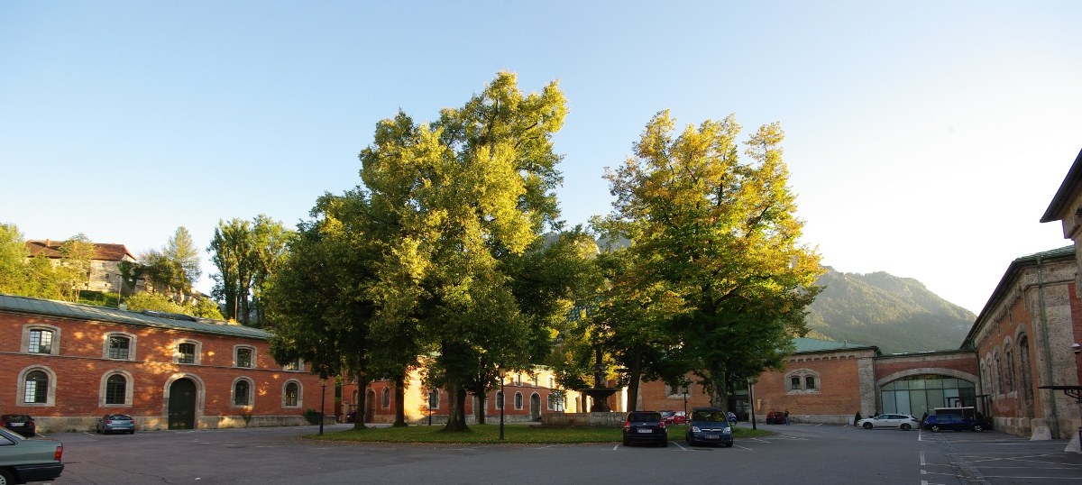 Alte Saline, 83435 Bad Reichenhall (u.a. Bauensemble E-1-72-114-9) Nördlicher InnenhofThis is a photograph of an architectural monument.